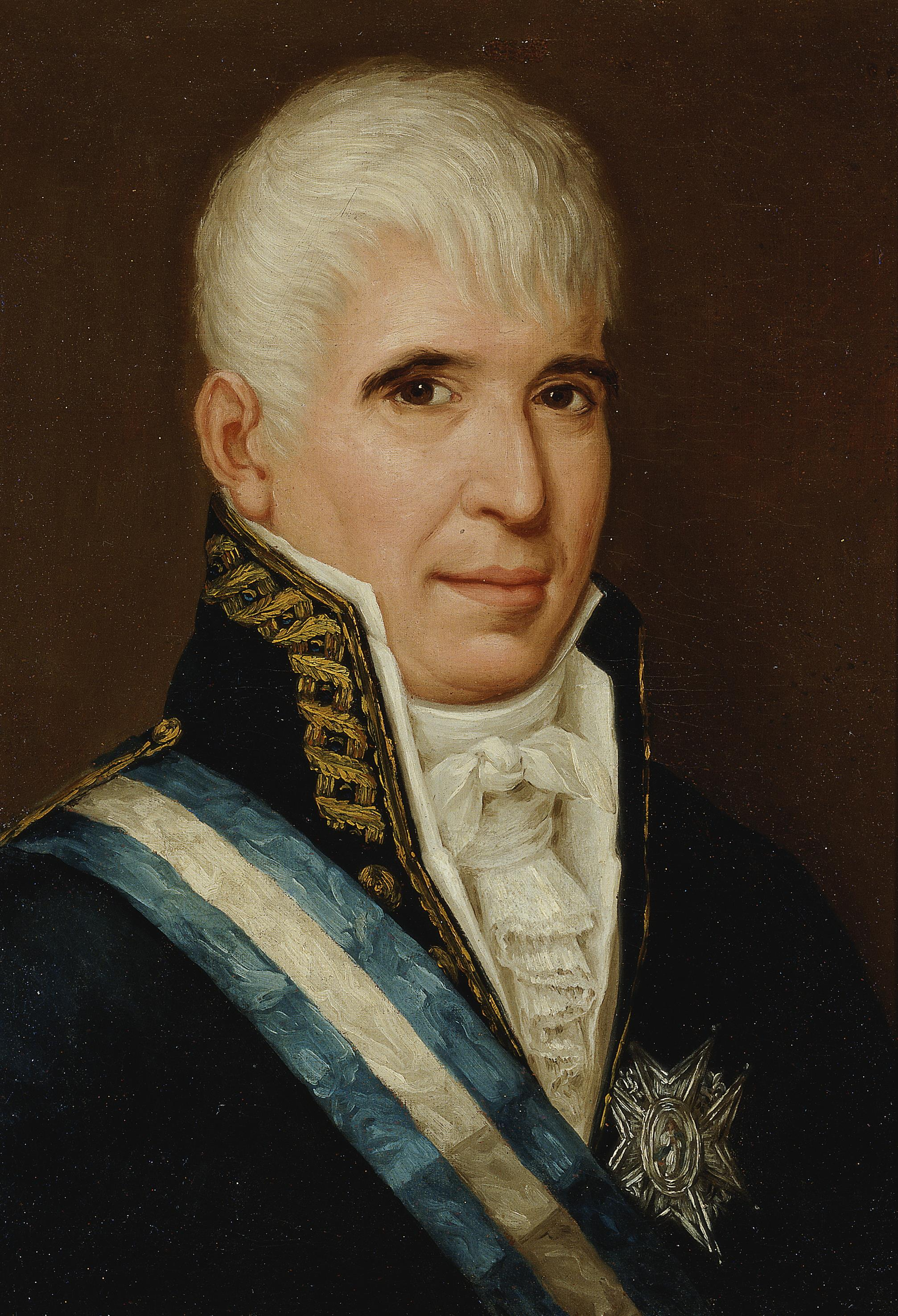 Retrato del politico español Francisco de Saavedra y Sangronis (1746-1819).